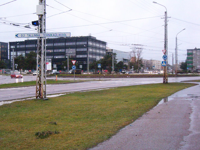 Sõpruse puiestee ja Ehitajate ning Akadeemia tee ringtee. Tallinn.